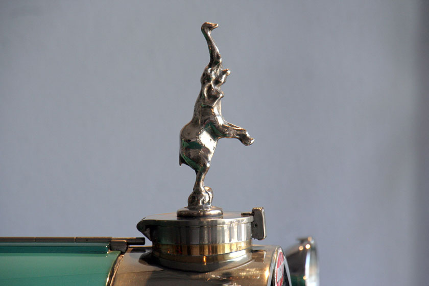 1920 Bugatti Typ 41 Royale_IMG_7315